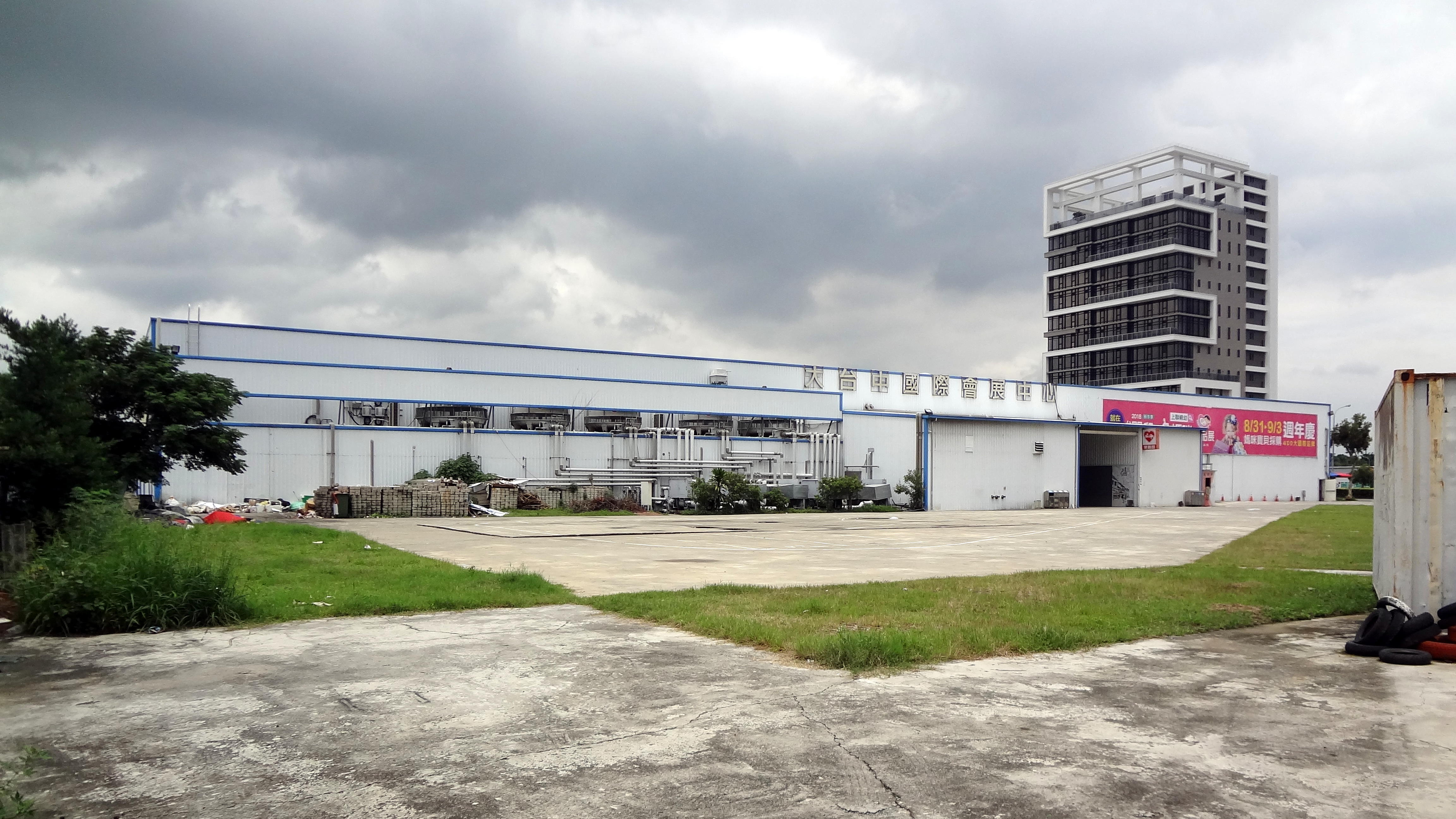 大台中國際會展中心正面外觀。